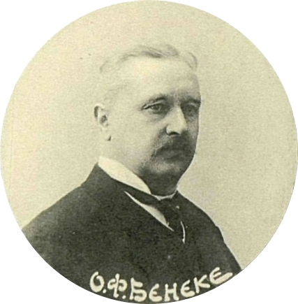 Оттон Федорович Бенеке, гласный Ревельской городской думы, член III Государственной думы от Эстляндской губернии.